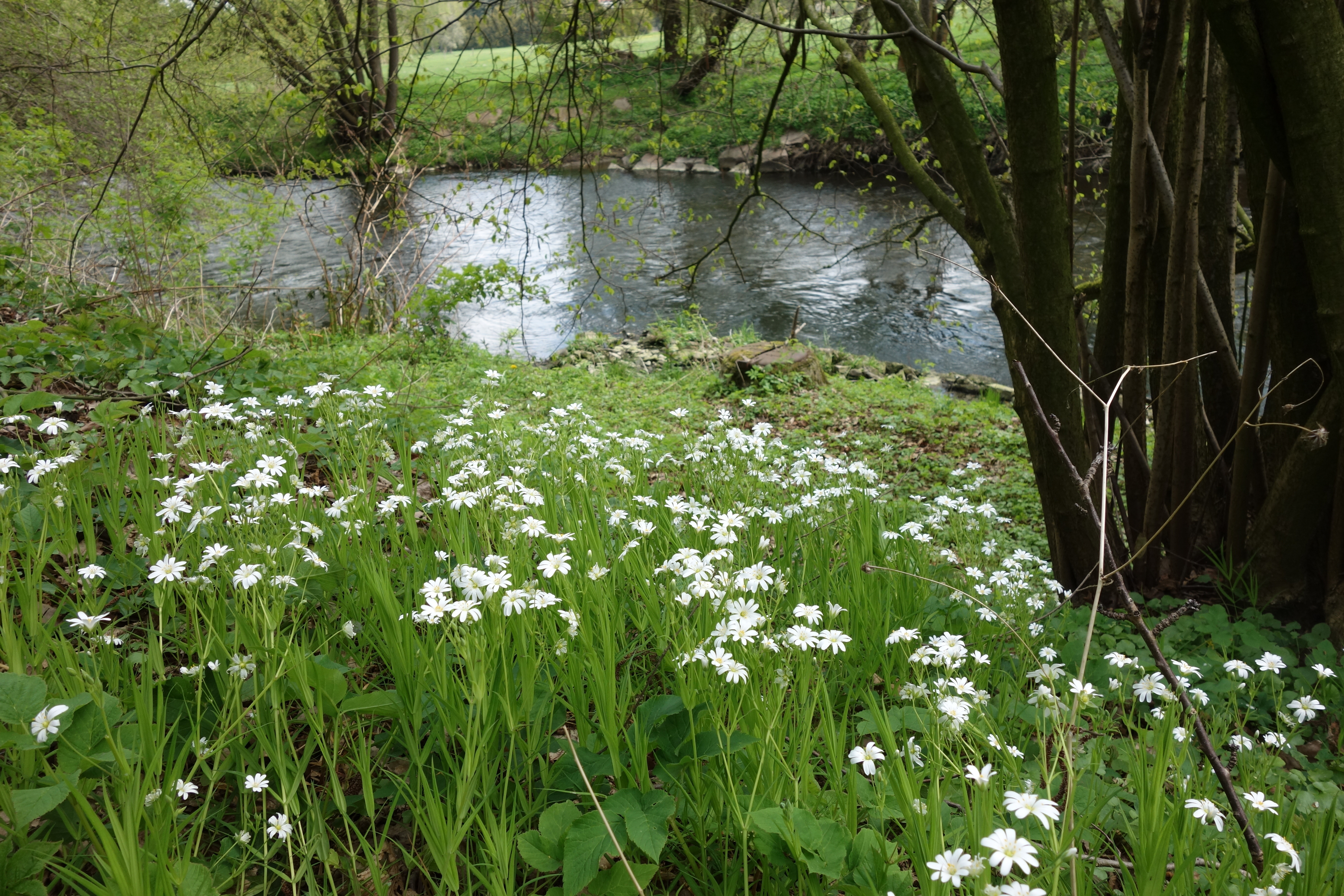 Naturbelassenes Flussufer an der Chemnitz im Naturschutzgebiet „Chemnitzaue bei Draisdorf“.